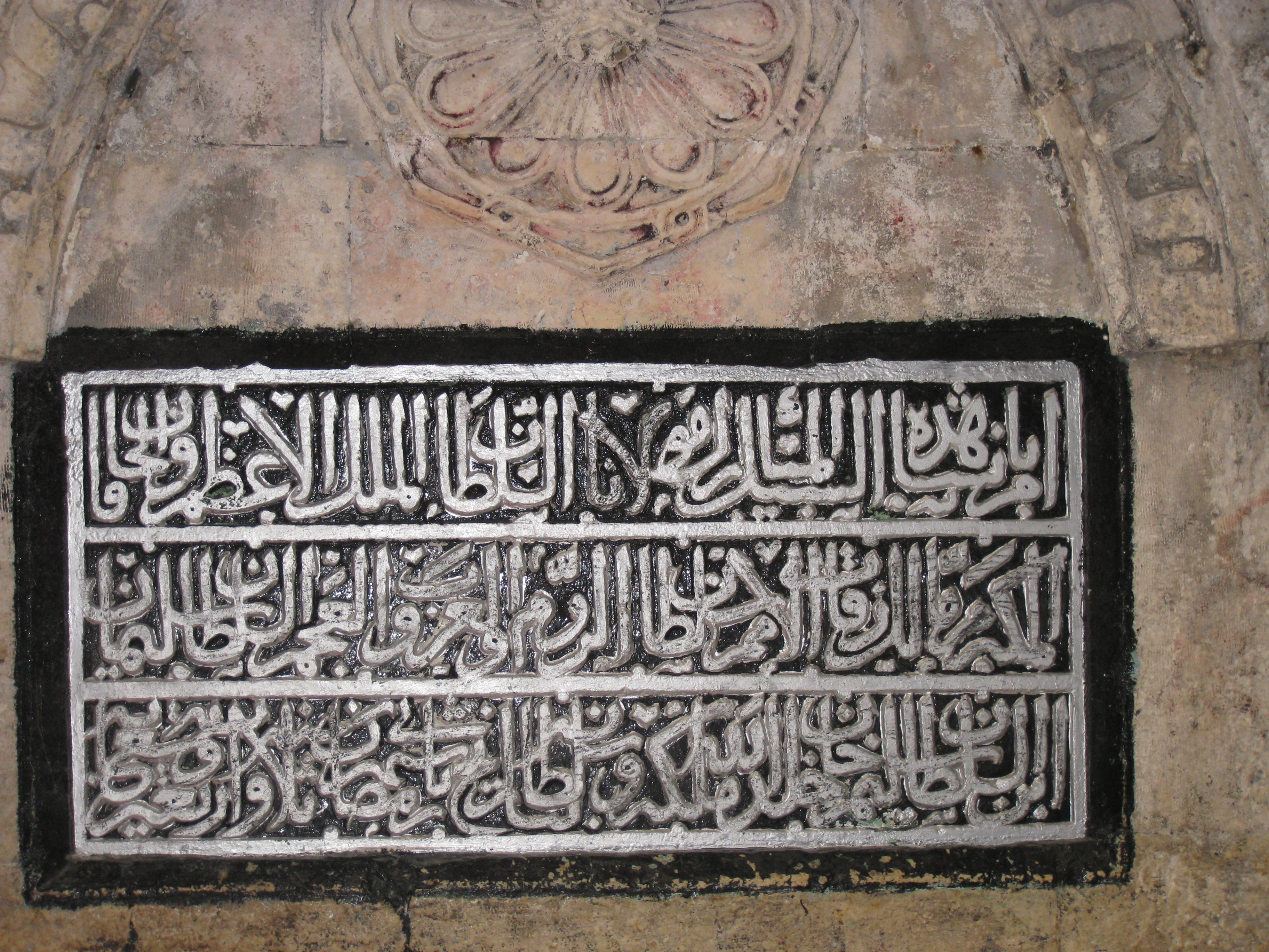 Muslim Quarter הרובע המוסלמי בירושלים